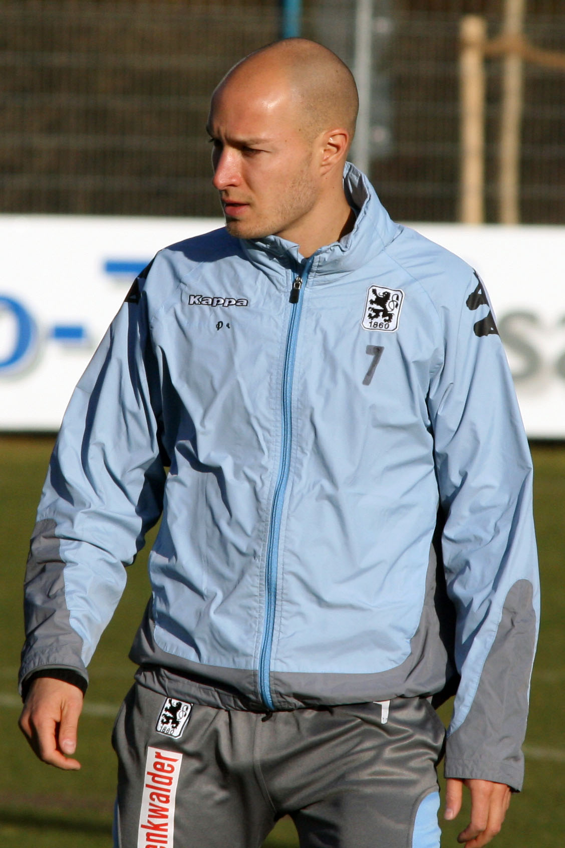 Nemanja Vučićević, player of TSV 1860 München, training, 20.01.2007, Grünwalder Str., Munich